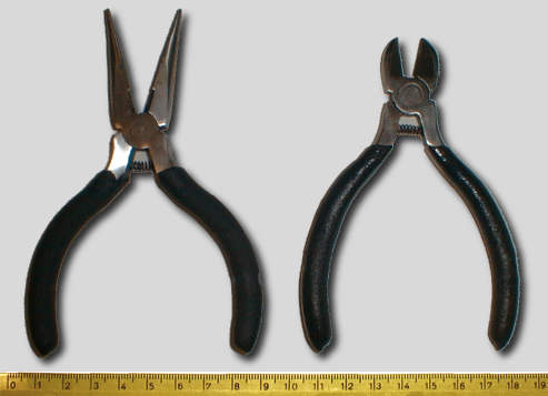 Zwei Elektronikzangen mit Maßstab; Spitzzange und Seitenschneider Eigenes Digitalfoto, nachbearbeitet mit GIMP, 7. 3. 2004 GFDL